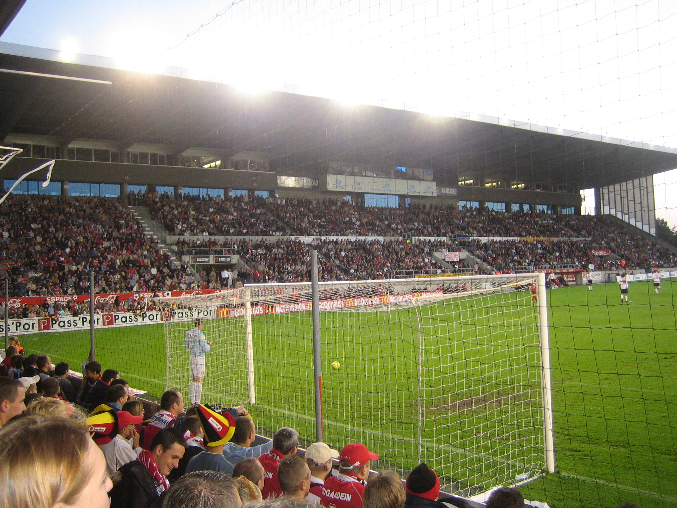 Nouvelle tribune du Canonnier